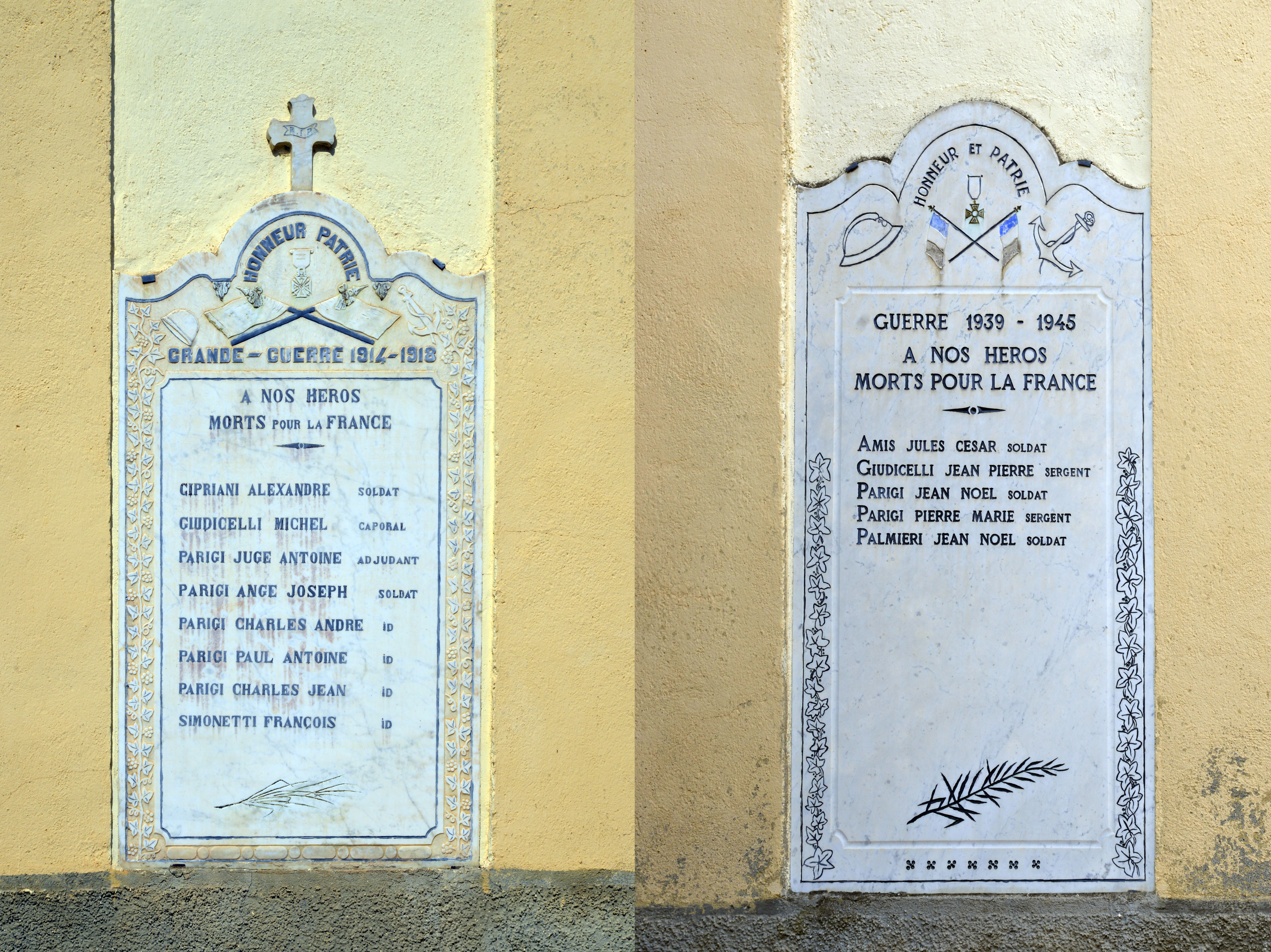 Castellare-di-Mercurio, Bozio (Haute-Corse) - Monument aux morts représenté par deux plaques de marbre, apposées de part et d'autre du portail de l'église paroissiale Saint-Pierre